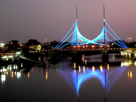 vista del puente del velero en el anochecer, situado encima del estero salado de la ciudad de guayaquil